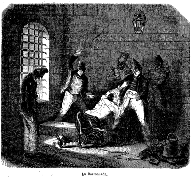 La bastonnade, punition récurente pour les bagnards indisciplinée.